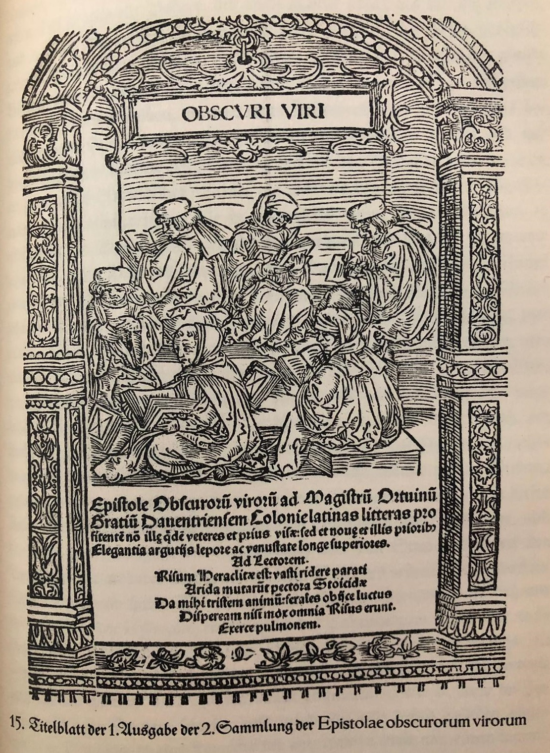 Titulná strana Epistolae